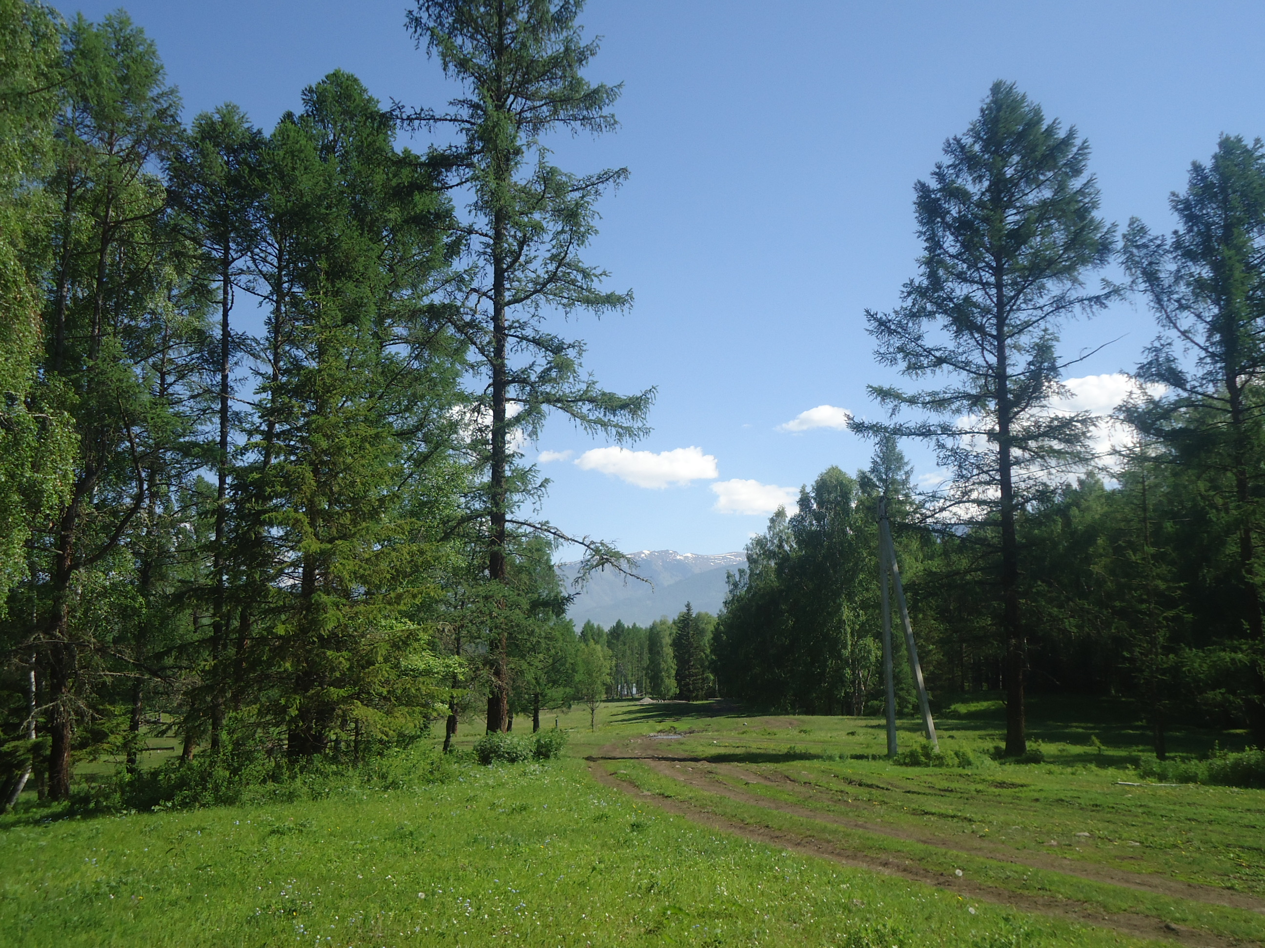 На окраине села Замульта.